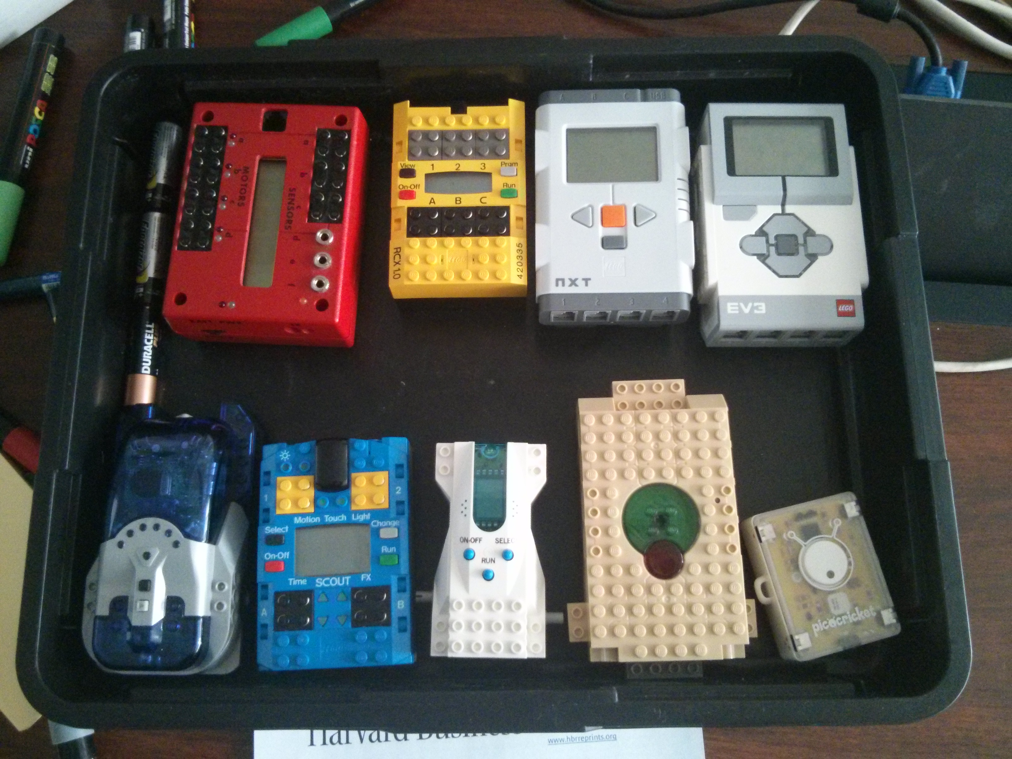 Plusieurs modèles de briques Lego Mindstorms, avec de haut en bas et de gauche vers la droite : Prototype de brique Lego Mindstorms créé par le MIT Media Lab en 1996 Première brique Mindstorms RCX commercialiée en 1998 Brique Mindstorms NXT commercialisée en 2006 Brique Mindstorms EV3 commercialisée en 2013 4 déclinaisons de briques Mindstorms commercialisées par Lego 1 brique PicoCrickets compatible Mindstorms créée par le MIT Media Lab et commercialisée en 2006